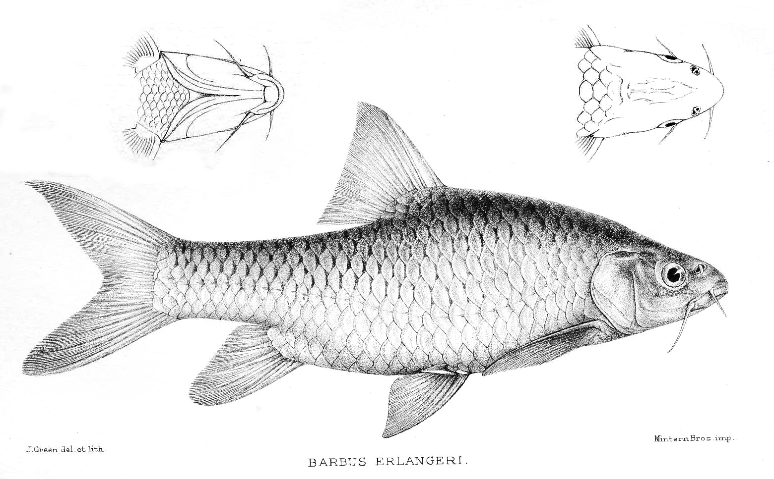 Barbus erlangeri = Barbus intermedius Rüppell 1835